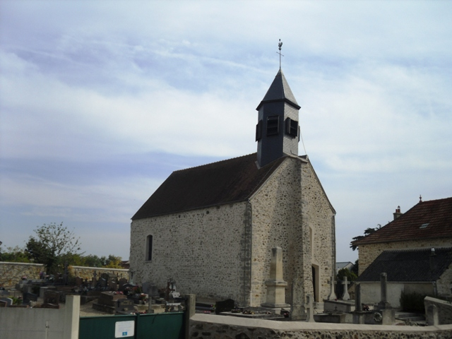 L'église Notre-Dame de la Nativité de la Très Sainte Vierge à Courcouronnes (91)